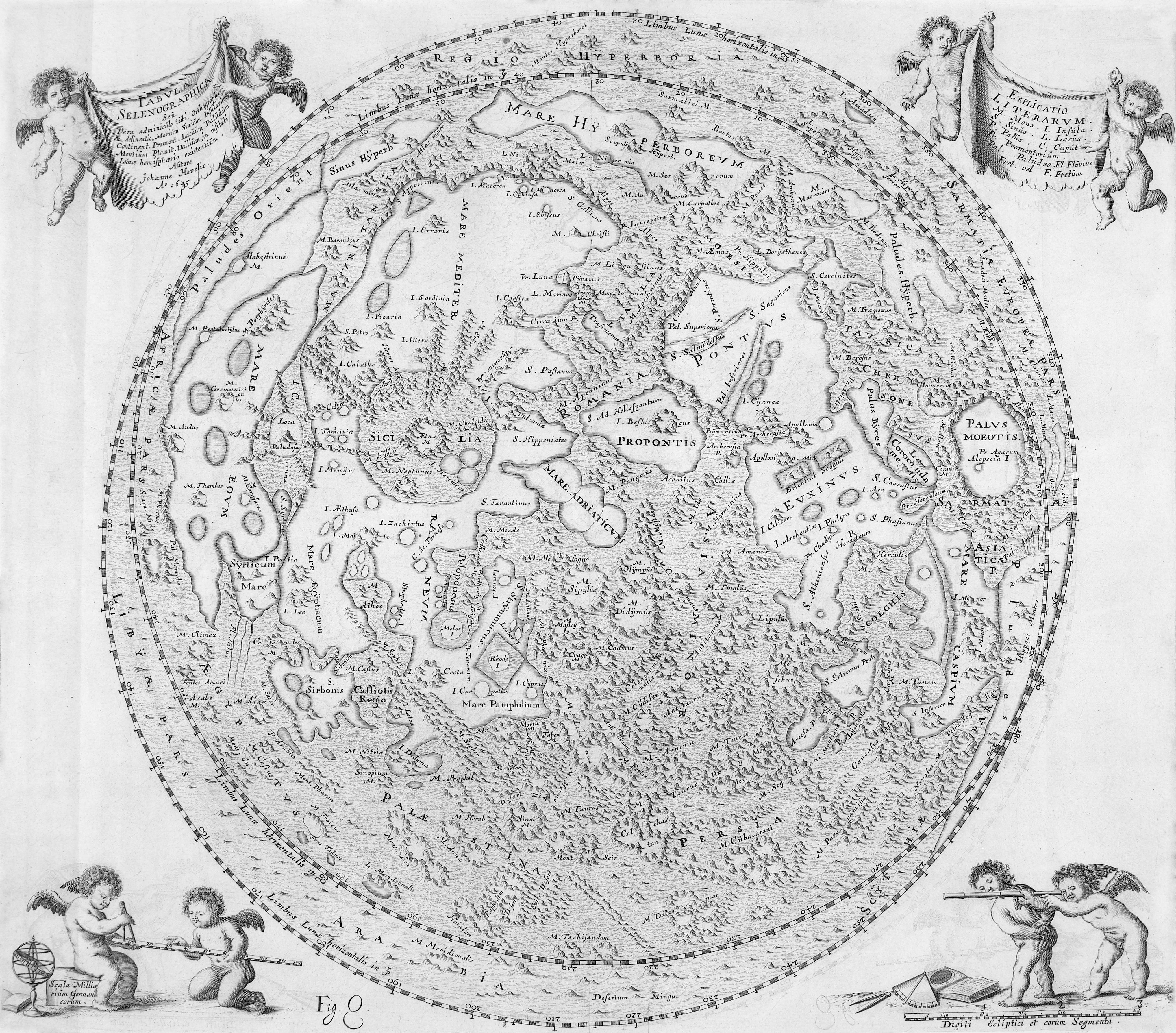 Johannes Hevelius-Carte de la lune, Selenographia, 1645